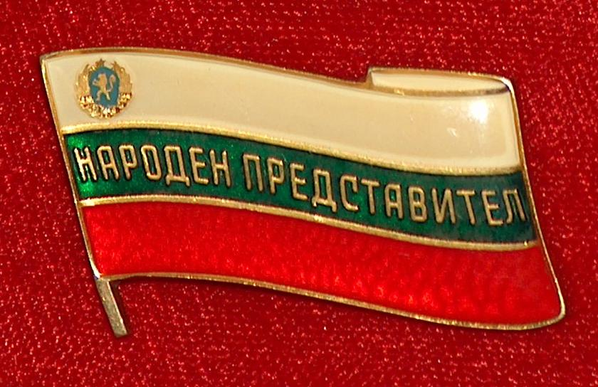 Знак „Народен Представител“ модел 1980г.